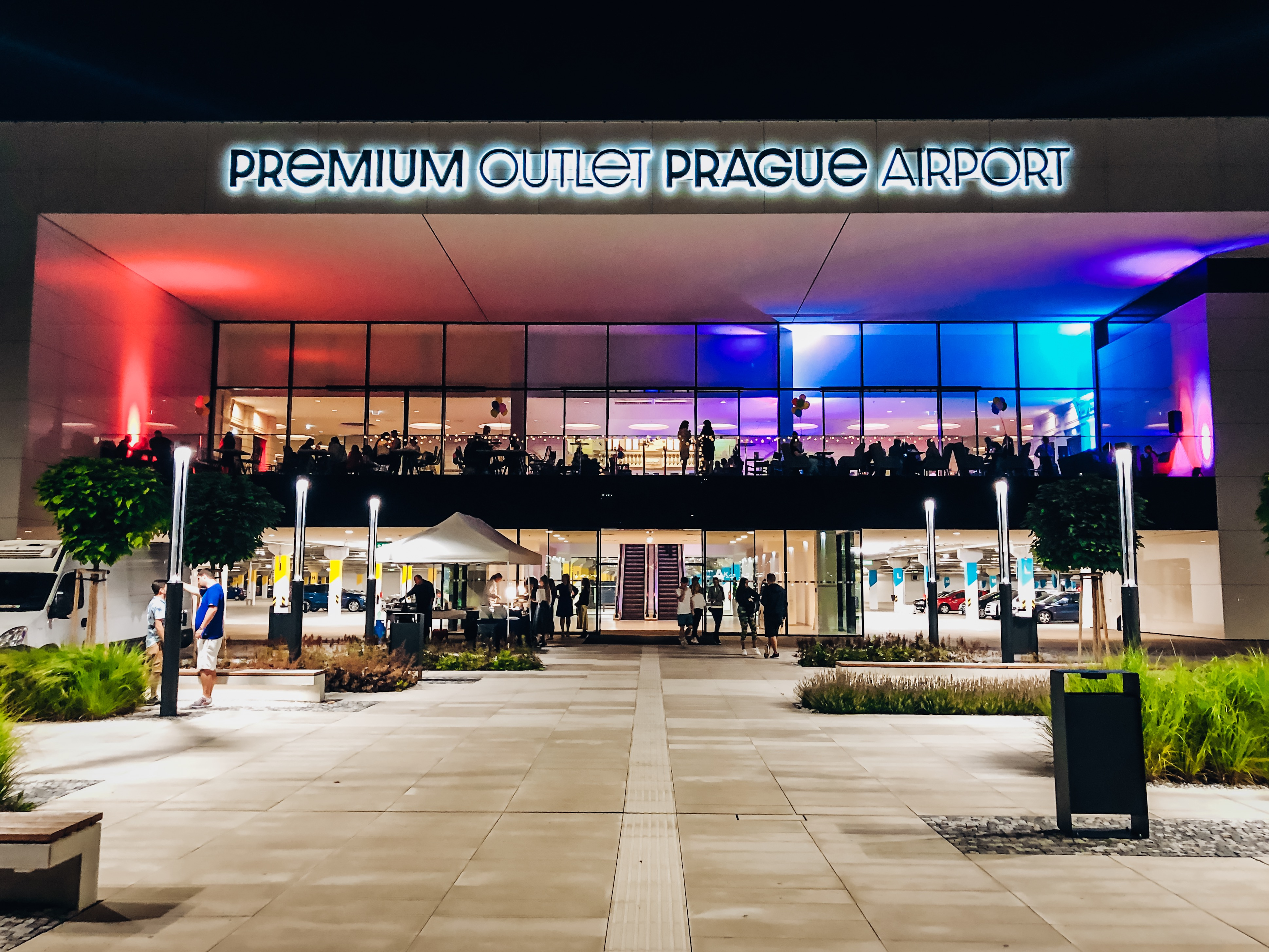 Premium Outlet Prague Airport vstupní portál